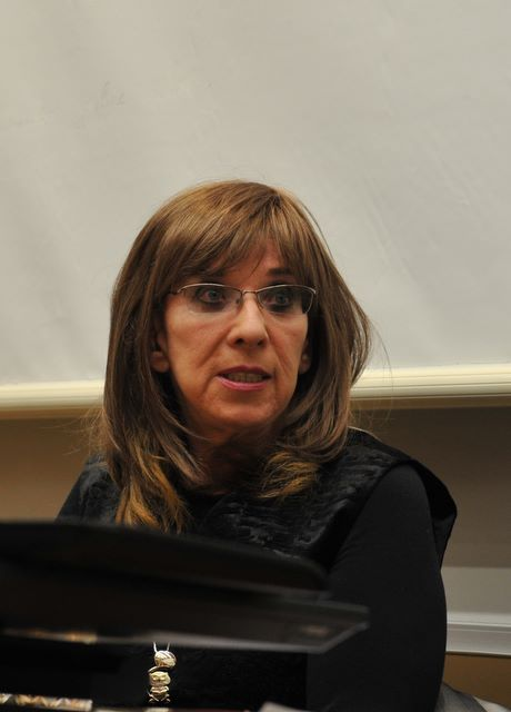 Svetlana Makarovič